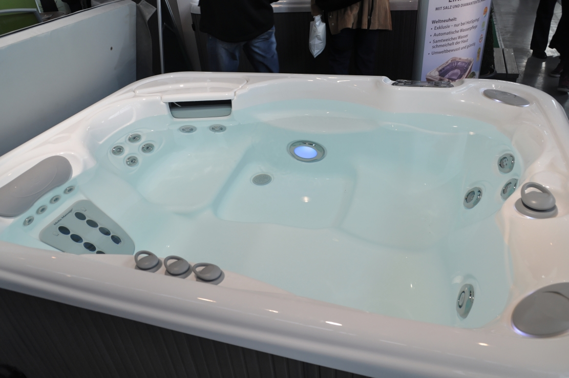 Messe Garten 2012 in Stuttgart Dieses Foto entstand durch Unterstützung des gemeinnützigen Vereins Skillshare.eu Skillshare e.V. ist ein eingetragener gemeinnütziger Verein zur Förderung der Bildung durch Unterstützung der Erstellung, Sammlung und Verbreitung so genannten freien Wissens. IBAN: DE16 8306 5408 0004 8850 66 BIC: GENODEF1SLR Bank: VR-Bank Altenburger Land